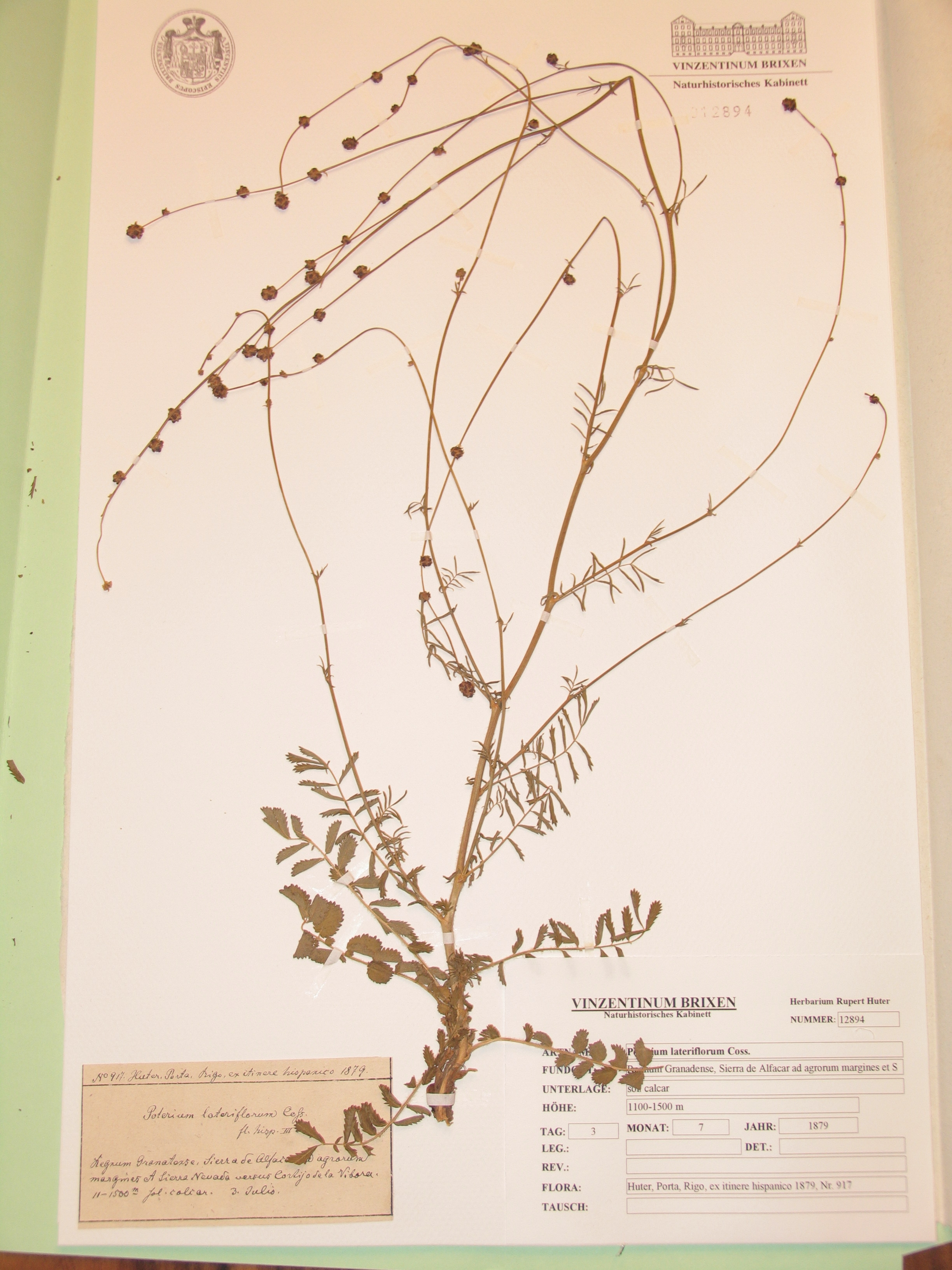 Ein Original Herbarbogen aus dem "Herbarium Huteri" des Vinzentinums